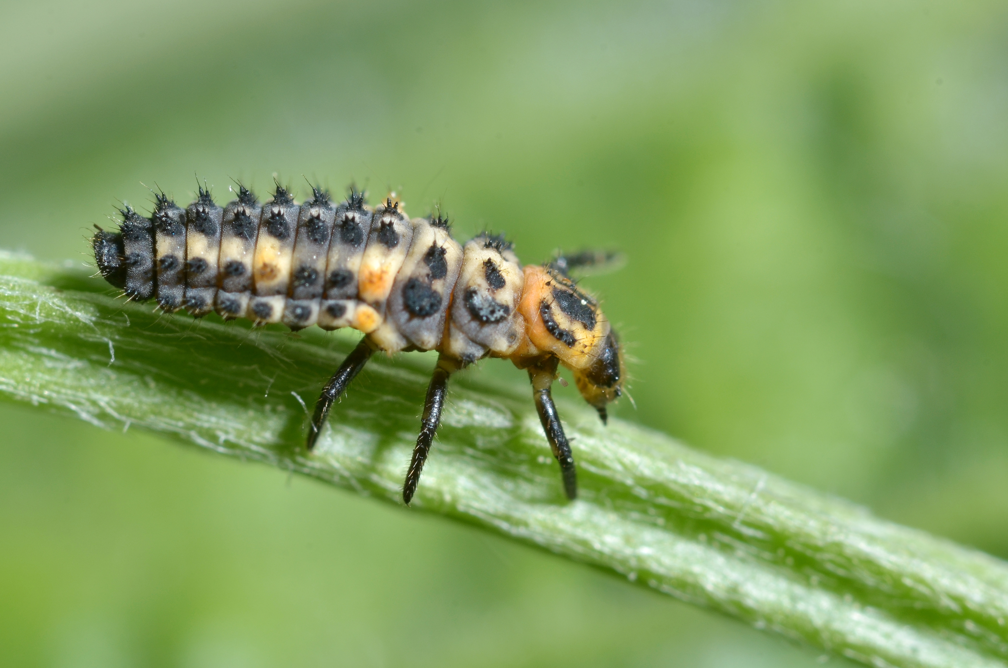 Hippodamia variegata larva. Parco Nazionale del Gargano, Vieste, Puglia, Italy.